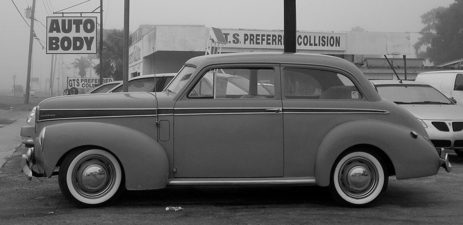 1941 Studebaker Champion 2-door sedan